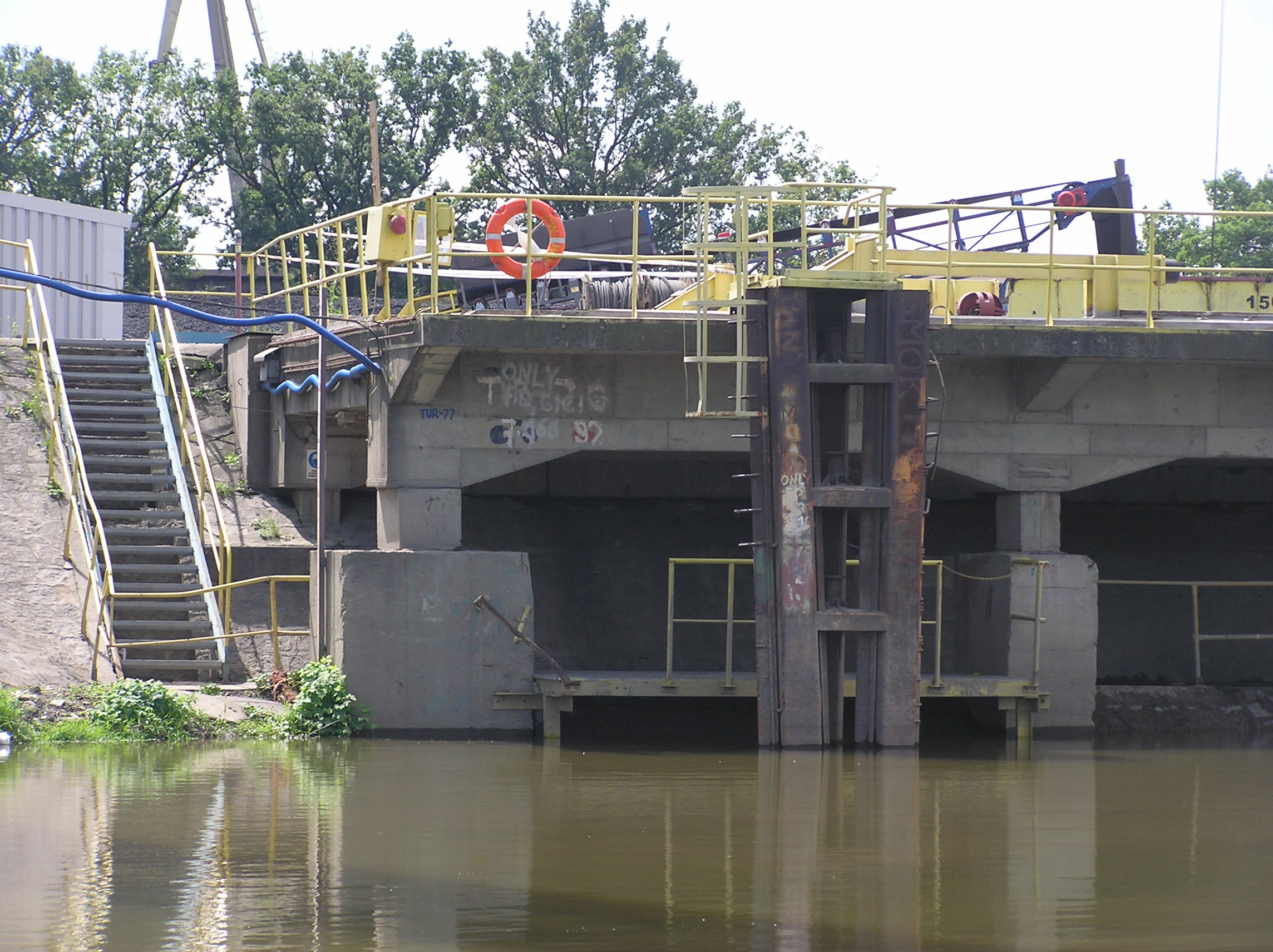 Wrocław, Kleczków, Odra - Kanał Miejski/Stara Odra, Przeładownia Elektrociepłowni Wrocław